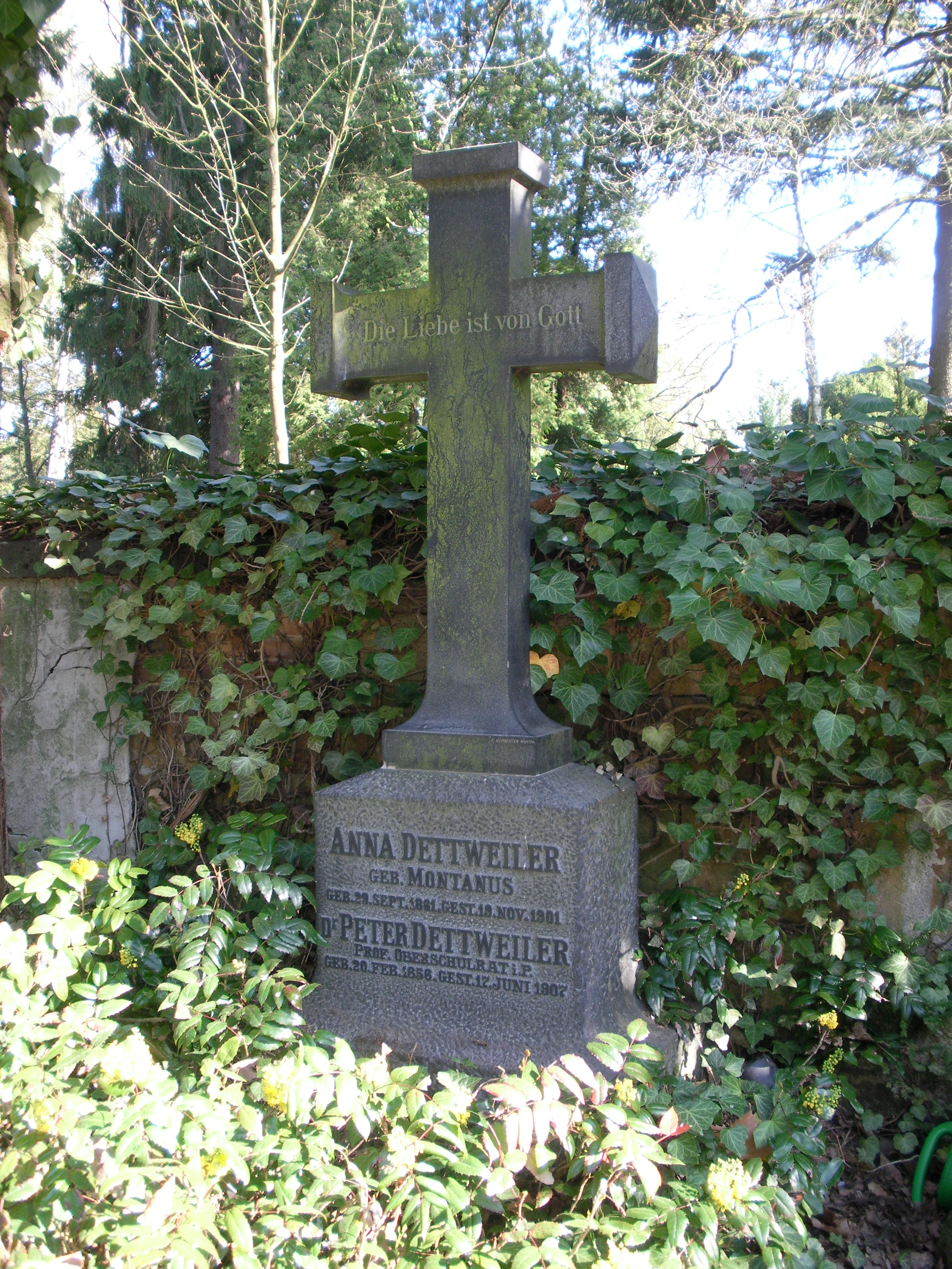 Grabmal von Peter Dettweiler auf dem Alten Friedhof in Gießen